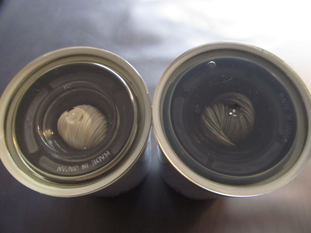 TORAYトレビーノ浄水器用フィルターカートリッジ新古